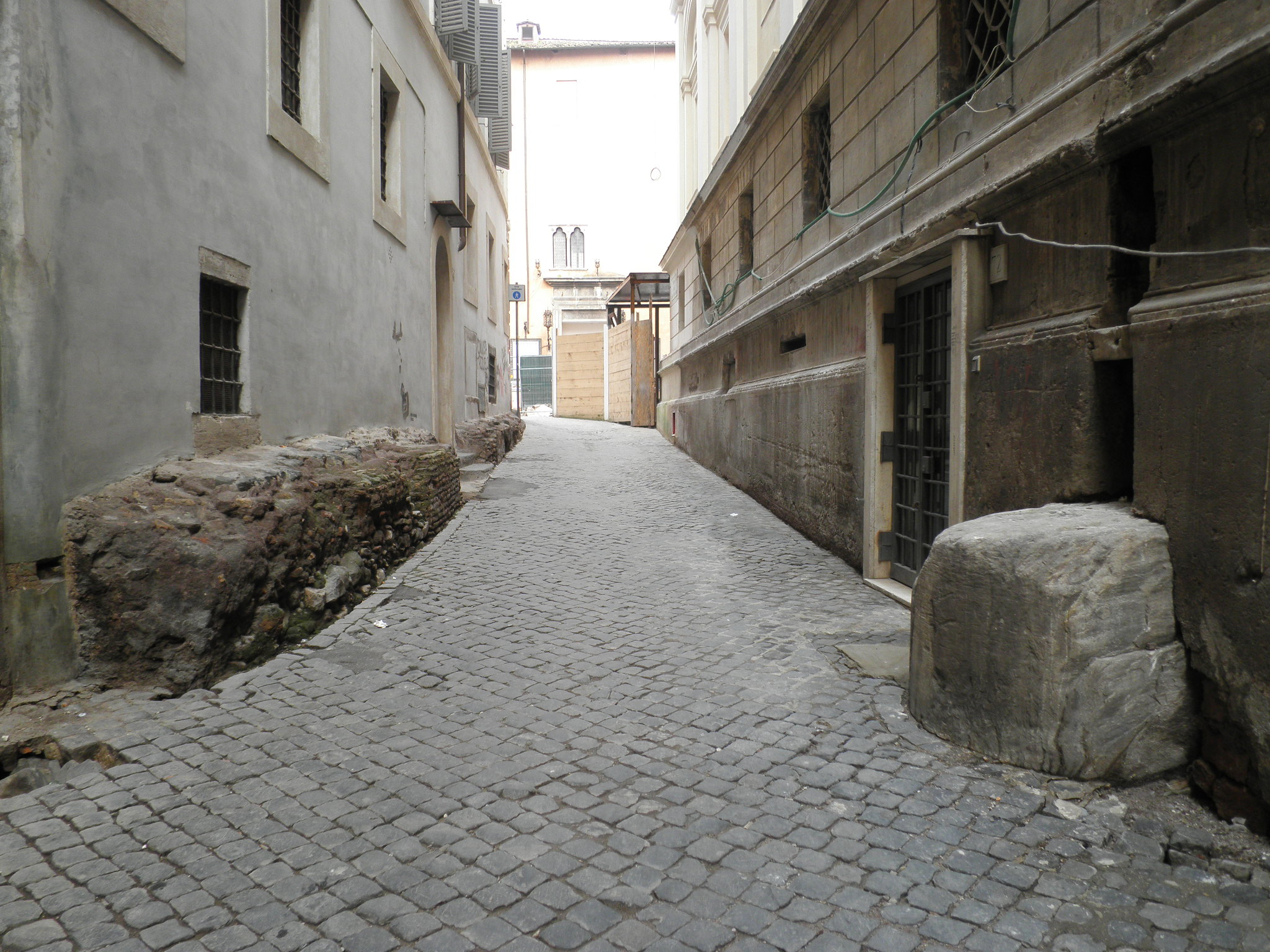 Roma, vicolo della Spada di Orlando verso piazza Capranica: murature pertinenti al tempio di Matidia.